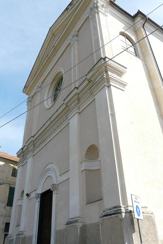 Chiesa parrocchiale di San Bartolomeo, San Bartolomeo al Mare, Liguria, Italia